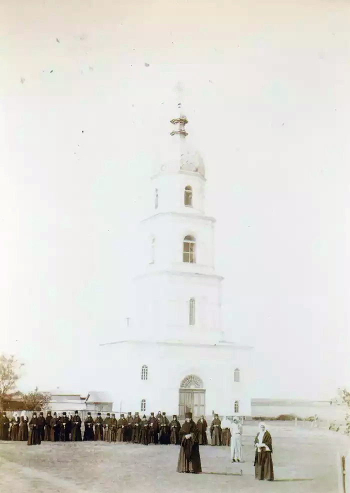 Колокольня в Тихвинском Богородицком монастыре (Бузулук)